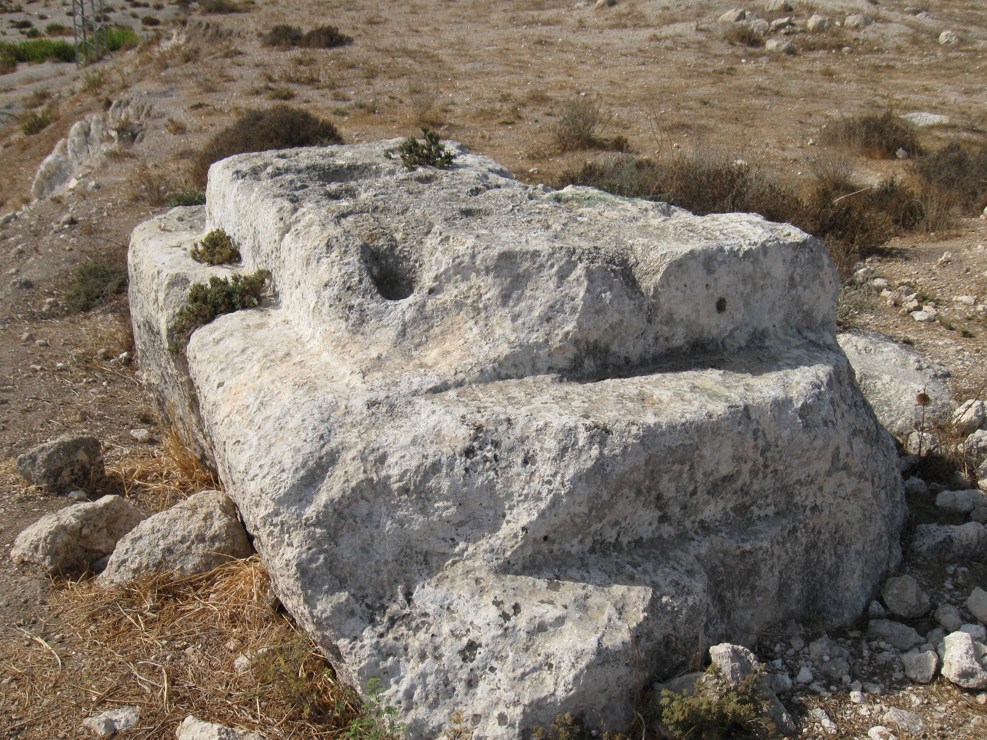 מזבח מנוח